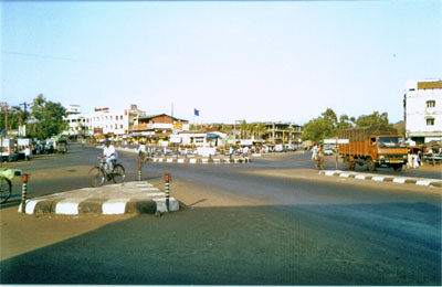 Bahadur Sheik Naka, Chiplun, Maharashtra, India